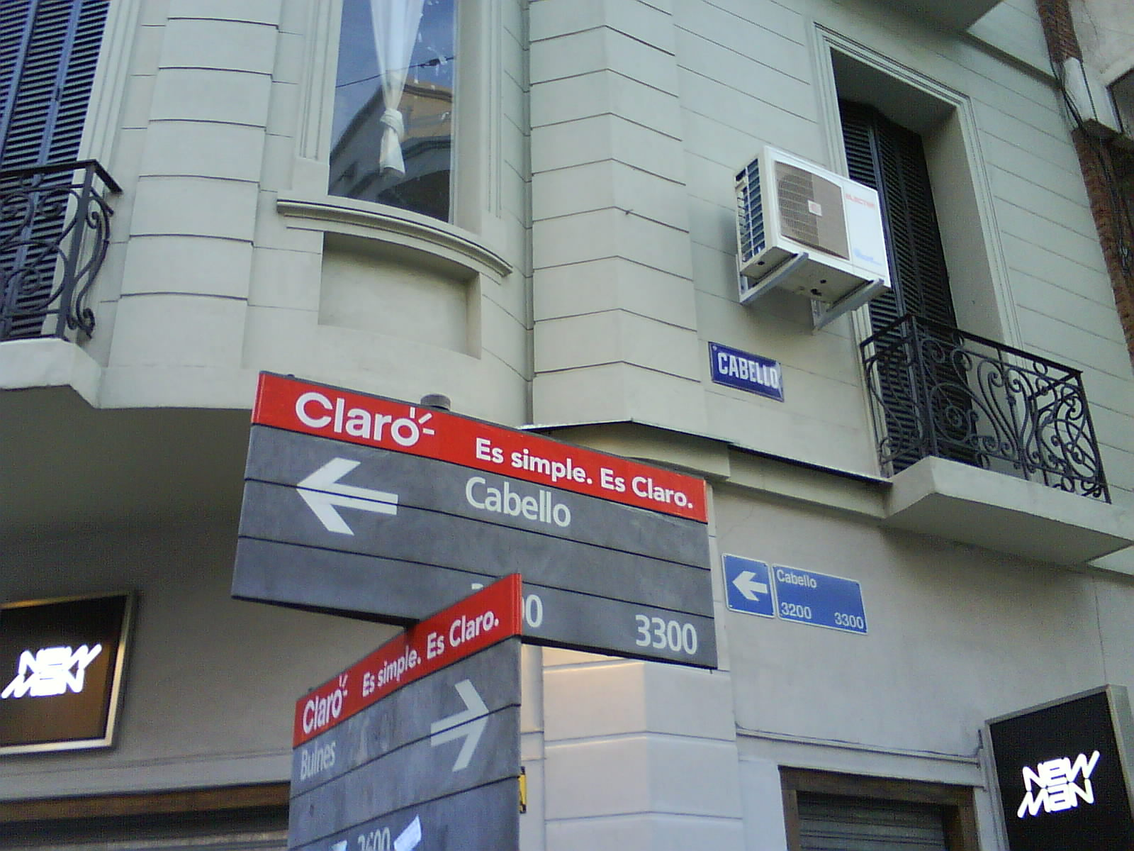 Superposición de nomencladores de calles de distintas épocas. Placa esmaltada tradicional, placa con vector de sentido y nomenclador con publicidad diseñado para la MCBA por Guillermo González Ruiz en 1993, variante no prevista en el Plan Visual de Buenos Aires.